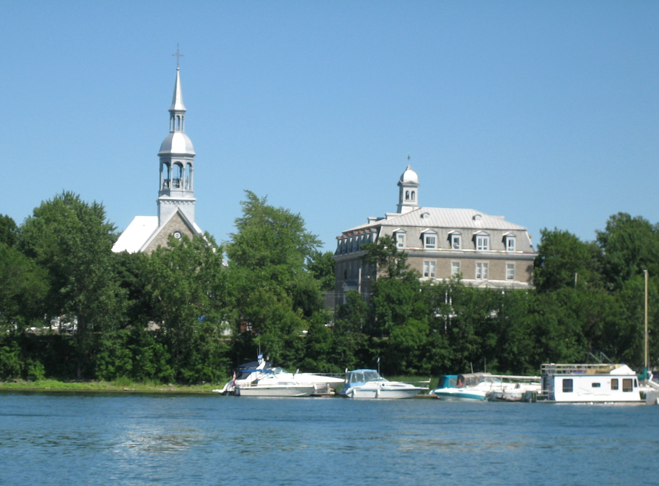 église Ste-Famille et ancien couvent de Boucherville, vue du fleuve St-Laurent